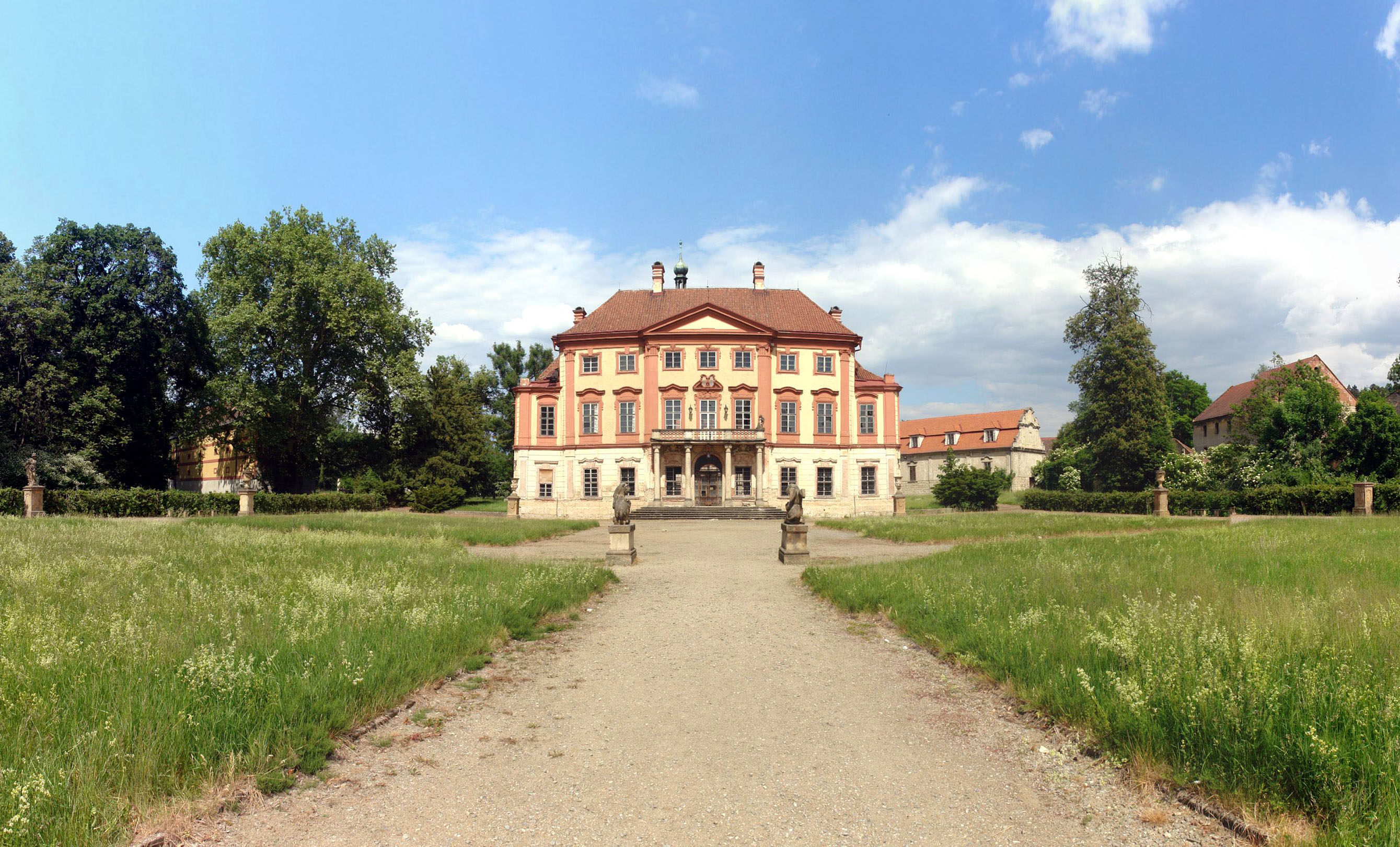 Zámek Liběchov, Pražská, nám. V. Levého, Litoměřická 143, Liběchov